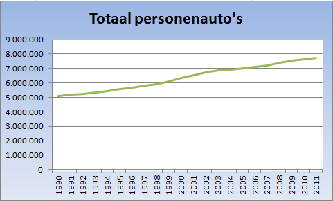 Ontwikkeling van het totaalaantal personenauto's in Nederland